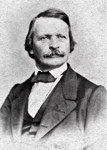 Ernst Erhard Schmid (1815-1885) deutscher Paläontologe, Petrograph, Metrologe, Mineraloge und Geologe